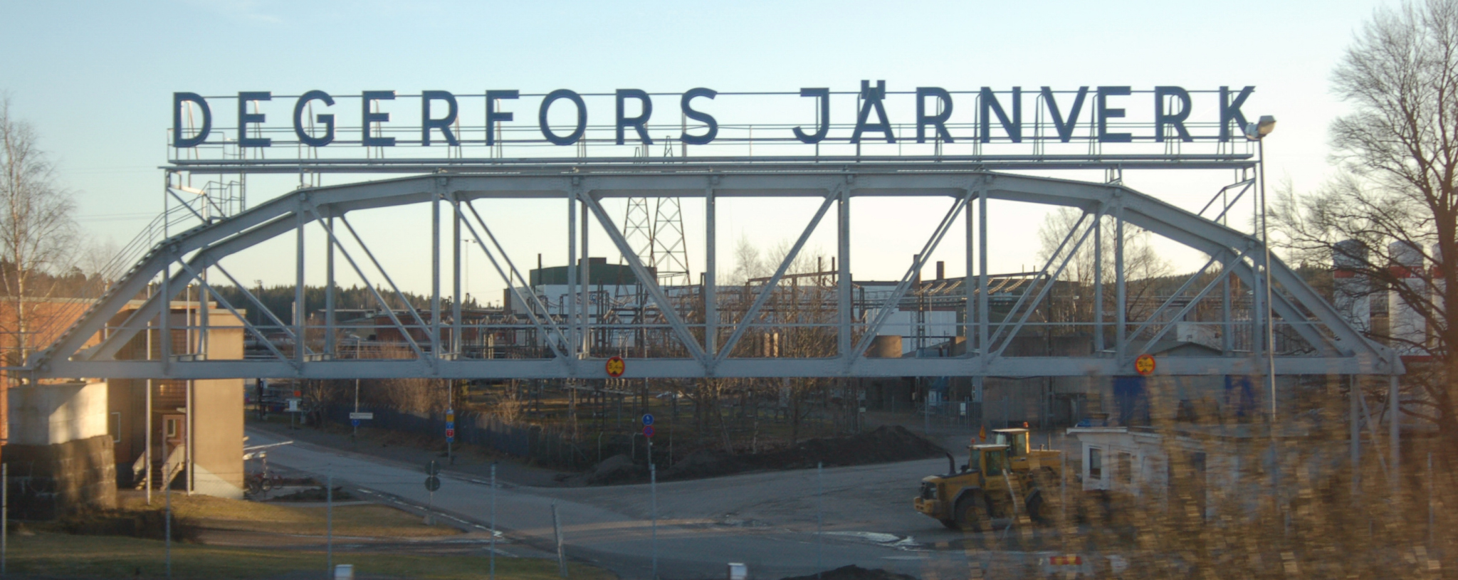 Degerfors järnverk industrial plant in Degerfors Sweden. Part of Outokumpu Stainless